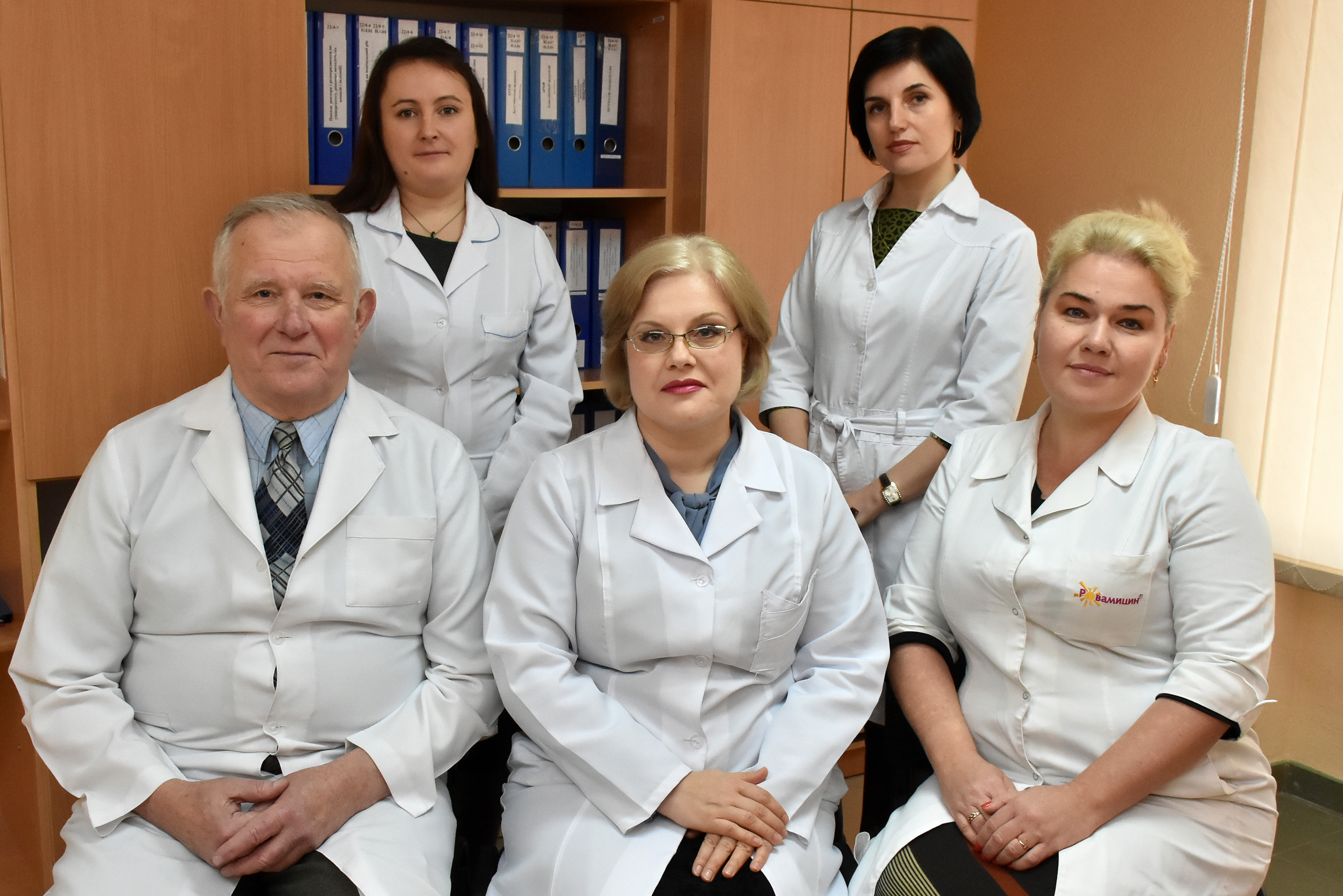 Кафедра медичної біоетики і деонтології Тернопільського державного медичного університету імені І. Я. Горбачевського. Сидять доцент, кандидат медичних наук Орест Березовський, професор, доктор медичних наук Наталія Волкова, доцент, кандидат медичних наук Тетяна Толокова, стоять: невідома, доцент, кандидат біологічних наук Марія Коваль.